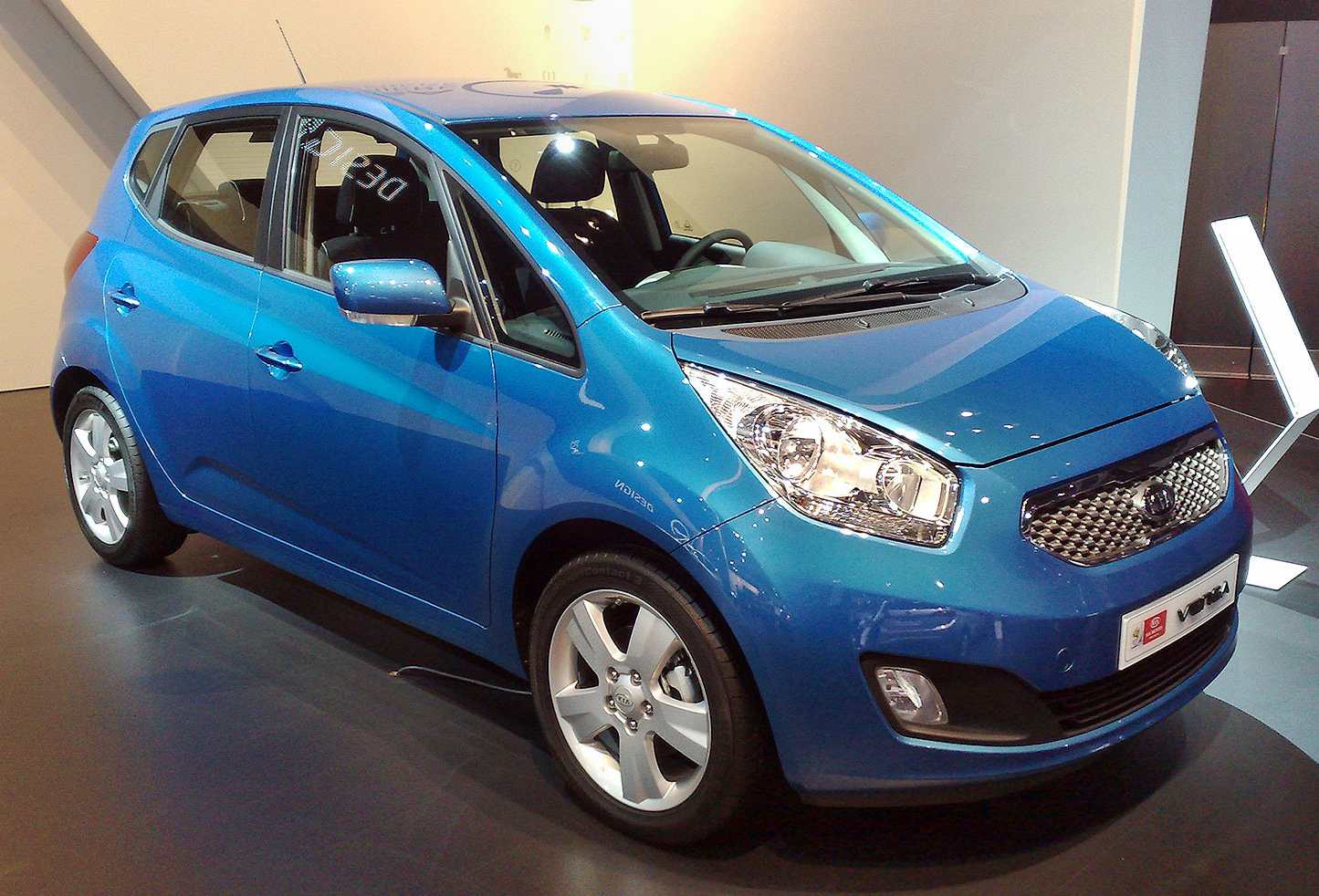 Kia Venga auf der IAA 2009